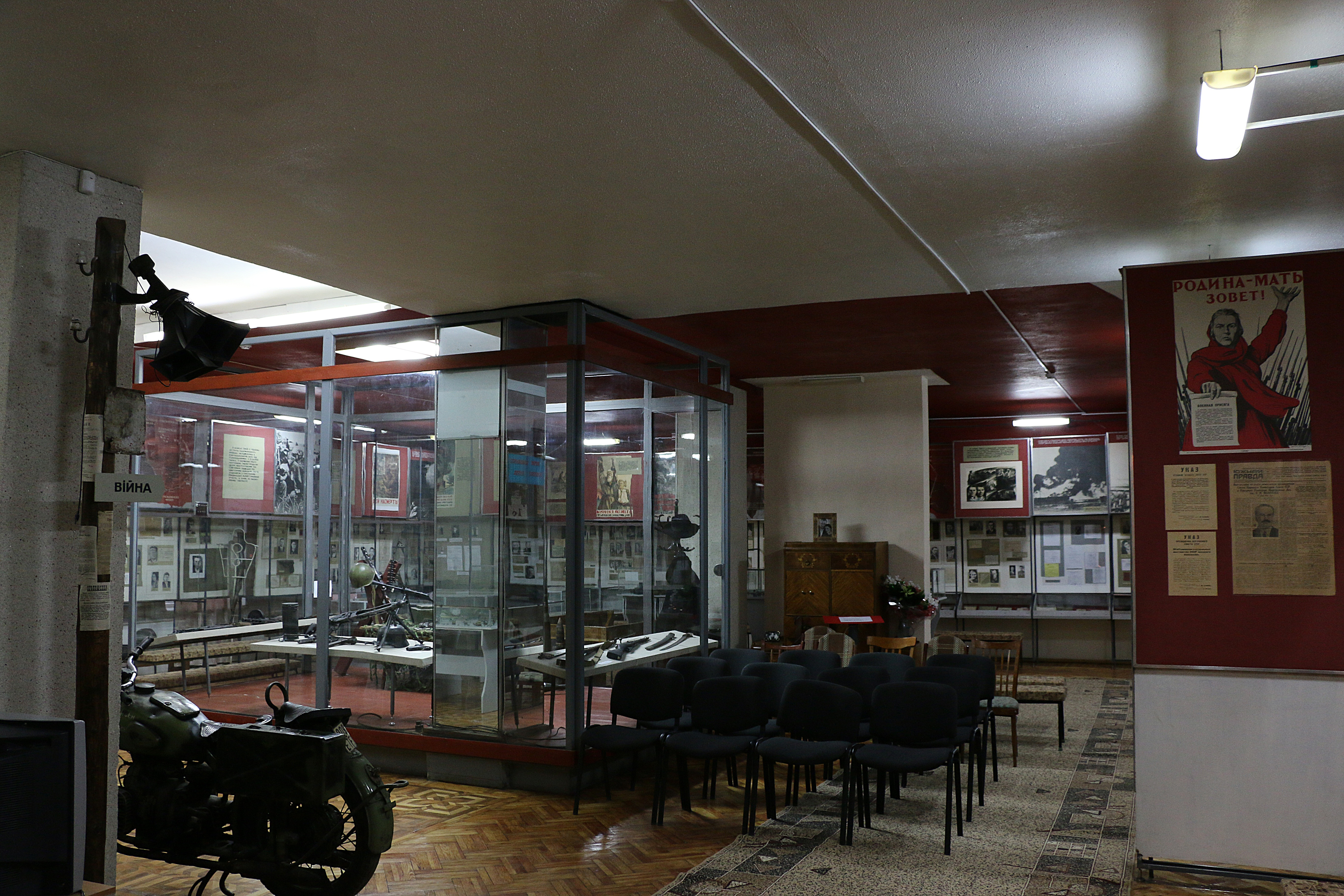 Житловий будинок-особняк, в якому в роки Великої Вітчизняної війни у 1941 – 1943 рр. мешкав розвідник, Герой Радянського Союзу В. О. Лягін, Миколаїв, вул. Лягіна, 5